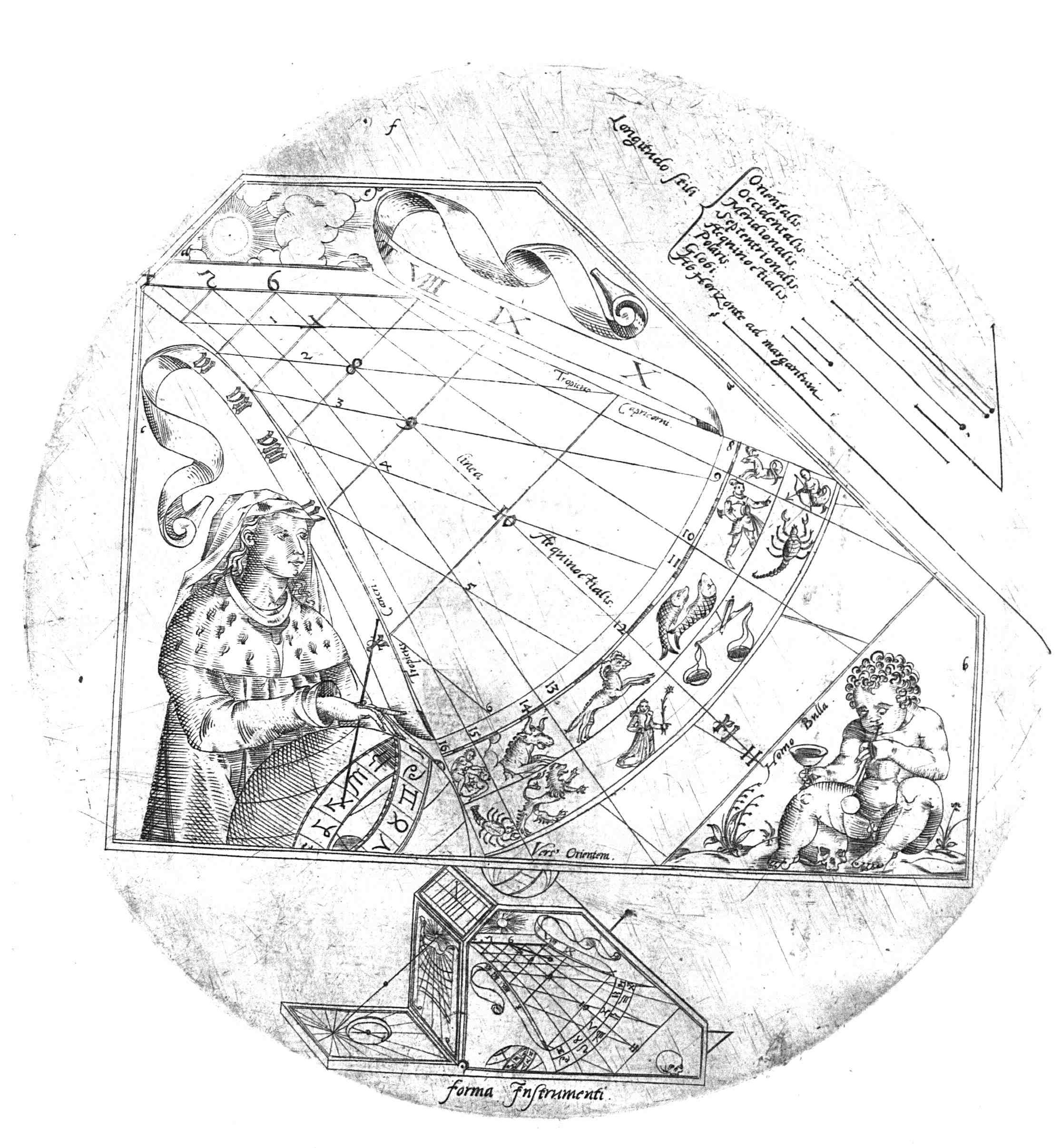 Leaflet / Flugschrift: "Underricht/ Wie das Eckichte Sonnen Uhr Stöcklein zugebrauchen..., Laugingen 1609"